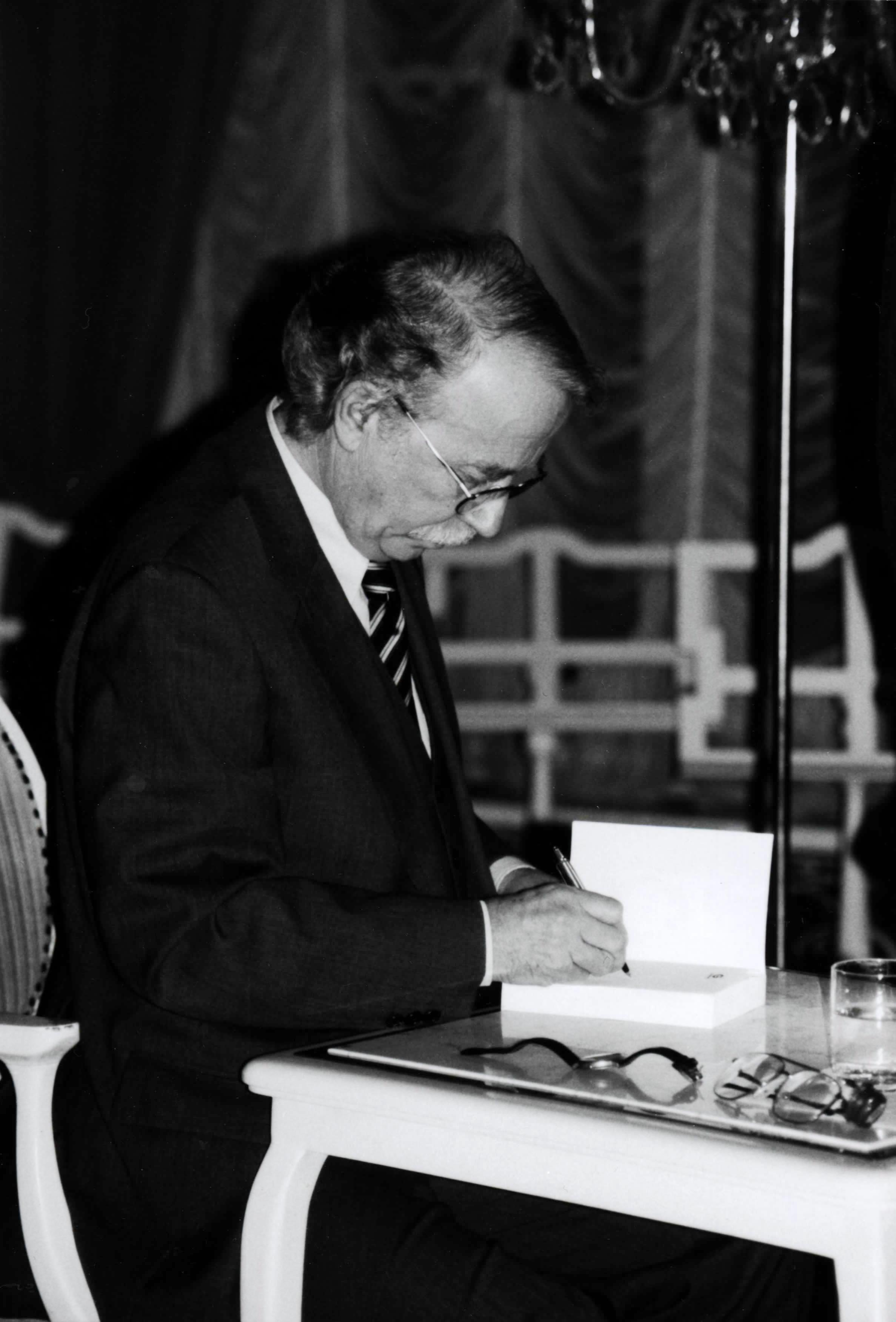 Der Autor Walter Kempowski 2002 bei einer Lesung und Signierung von Büchern im Barocksaal in Rostock